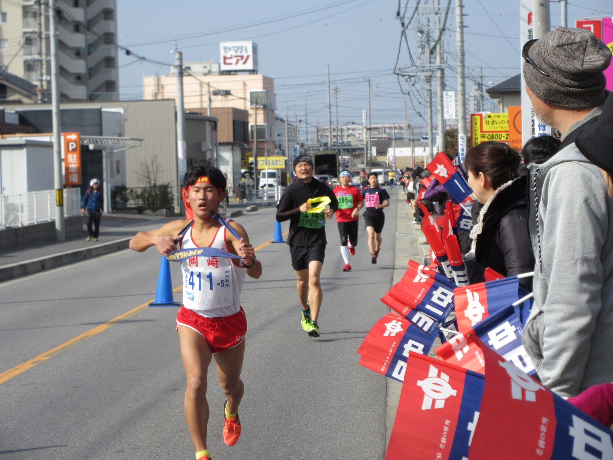 岡崎市民駅伝競走大会